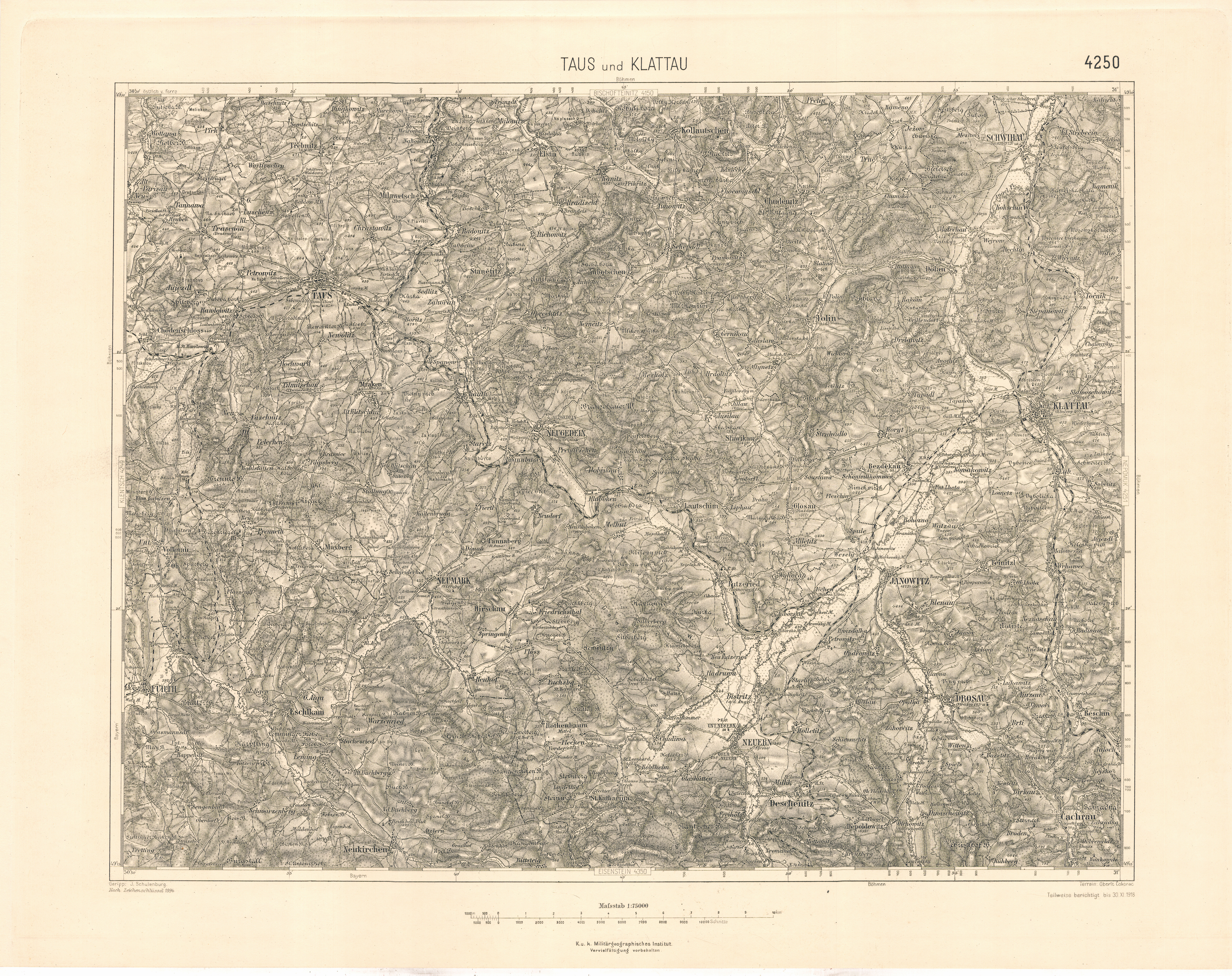 historische Landkarte: Spezialkarte 1:75.000, franzisco-josephinische (3.) Landesaufnahme der österreichisch-ungarischen Monarchie. Blatt 4250 Taus und Klattau. Mit Schwihau, Neugedein, Neumark, Neuern, Janowitz, Drosau und Furth in Bayern (Chudenitz oben mitte rechts, westsüdwestlich Schwihau)